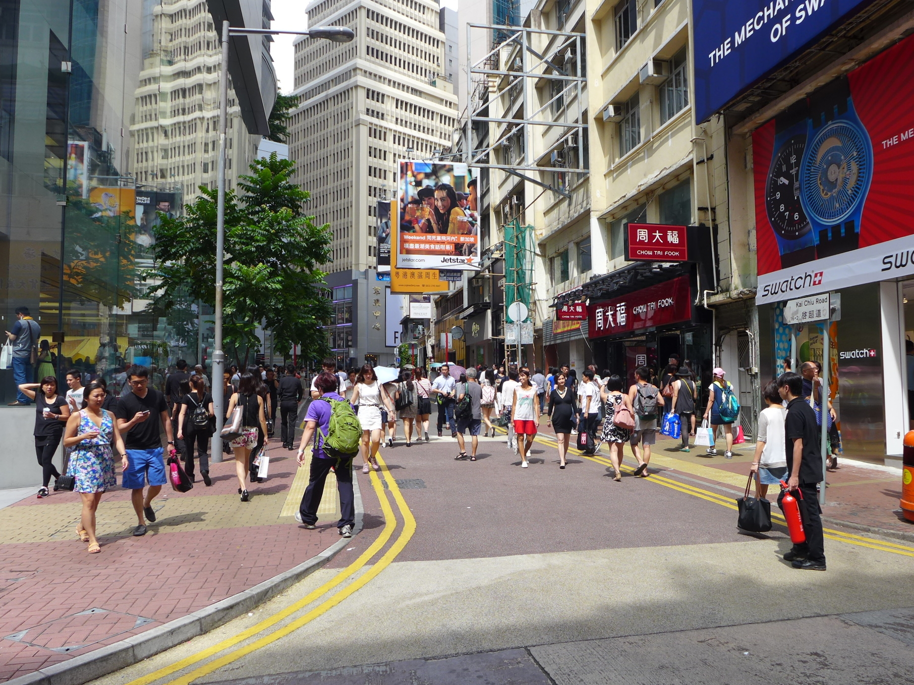 Kai Chiu Road